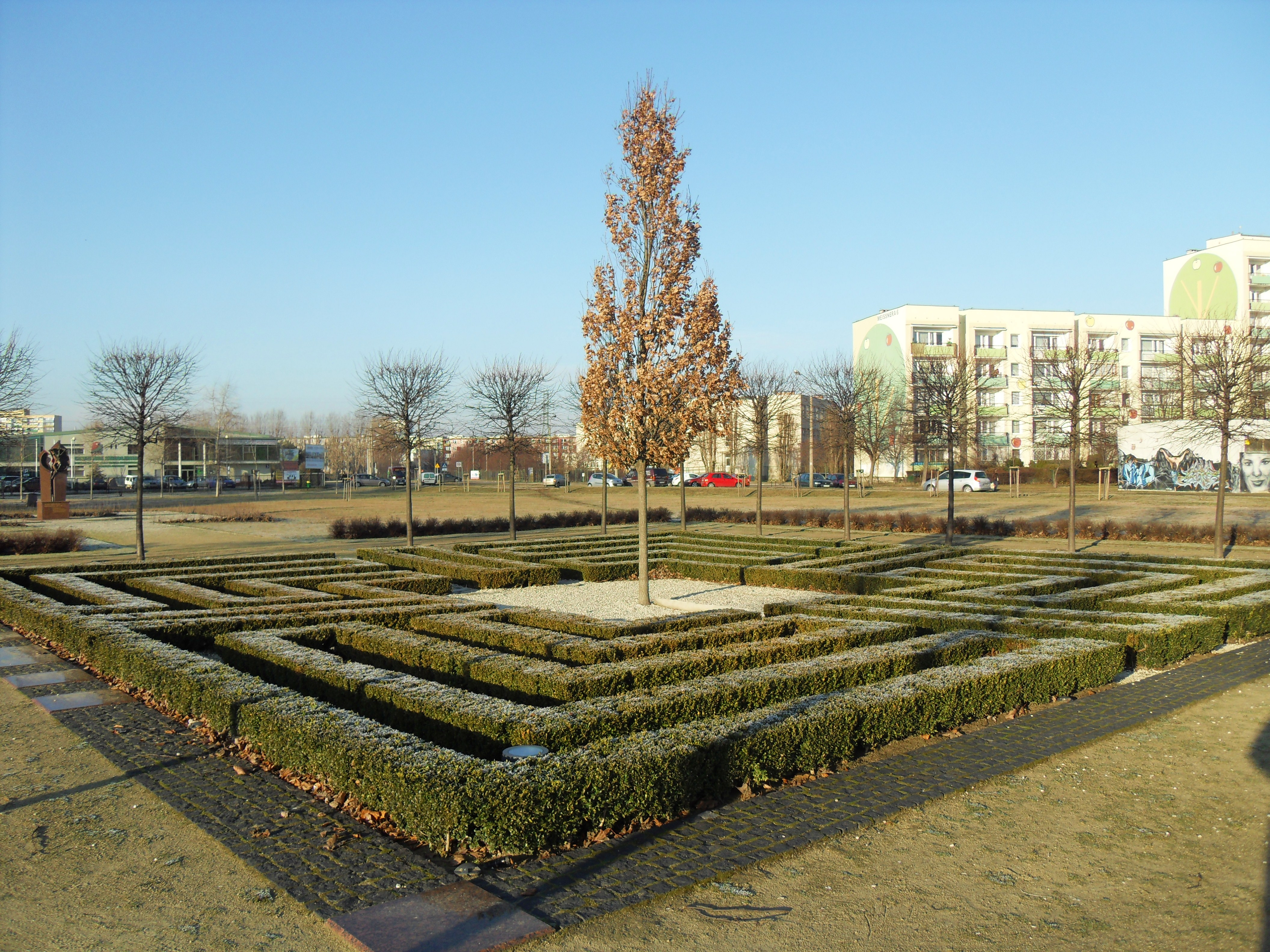 Gdańsk Zaspa, park im. Jana Pawła II. Zielony pomnik, upamiętniający pontyfikat JP II i 20-tą rocznicę mszy świętej na Zaspie.